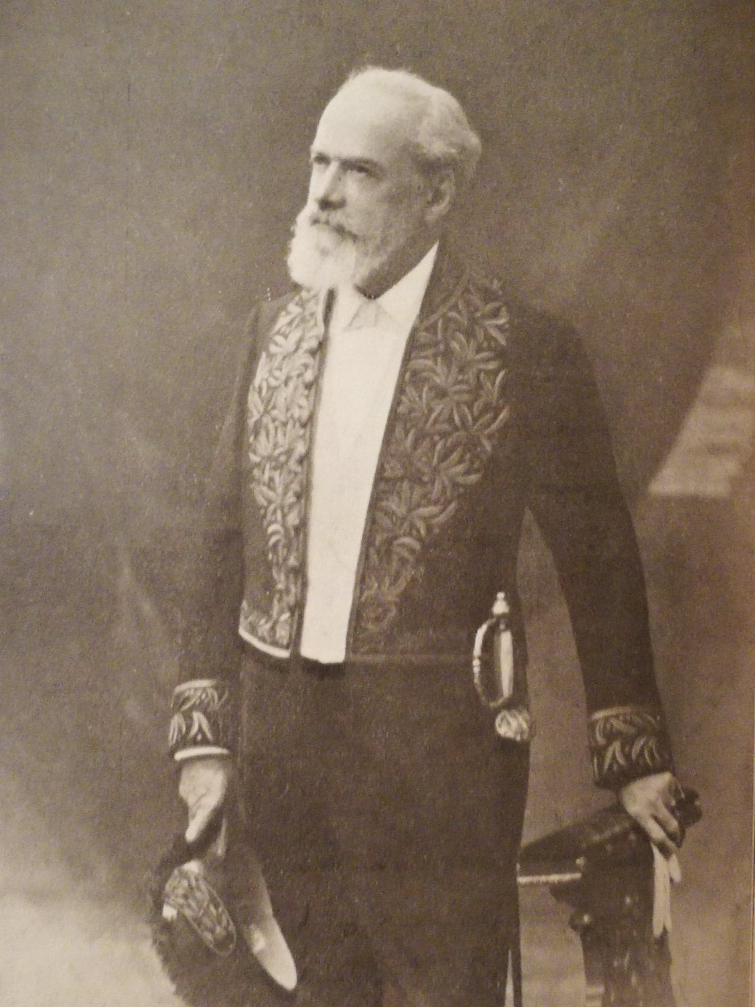 L'historien Gustave Fagniez (1842-1927) en uniforme d'académicien